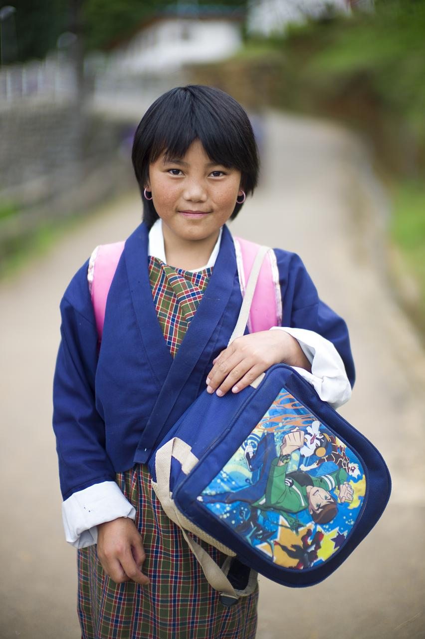 Bhutan